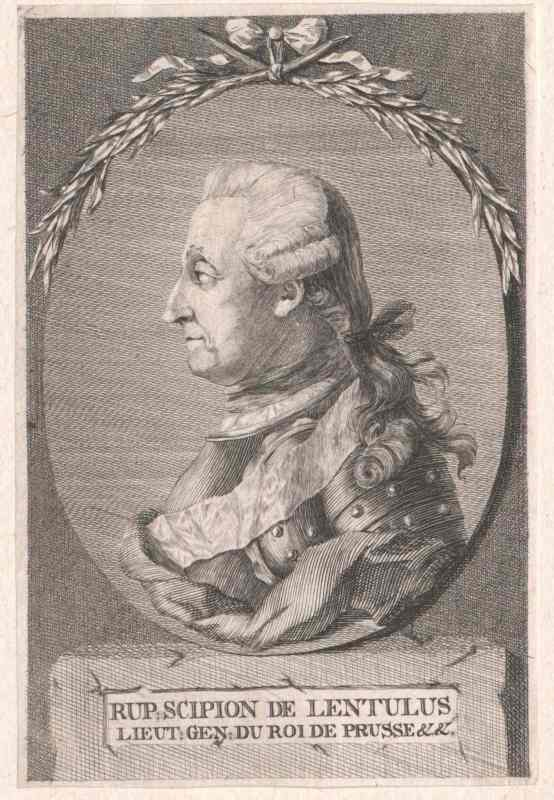 Robert Scipio von Lentulus (* 18. April 1714; † 26. Dezember 1786), schweizerischer Offizier in preußischen Diensten